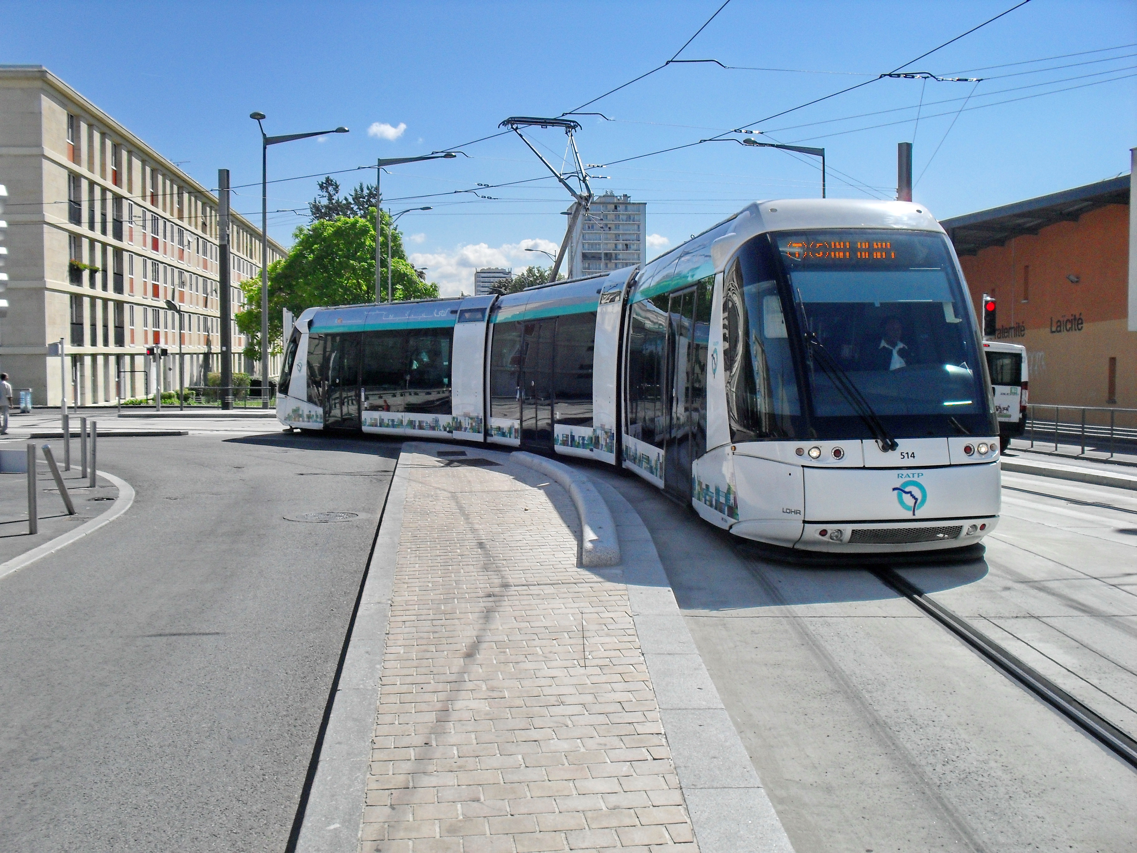 Une rame Translohr de la ligne T5 arrivant à la station "Les Flanades".